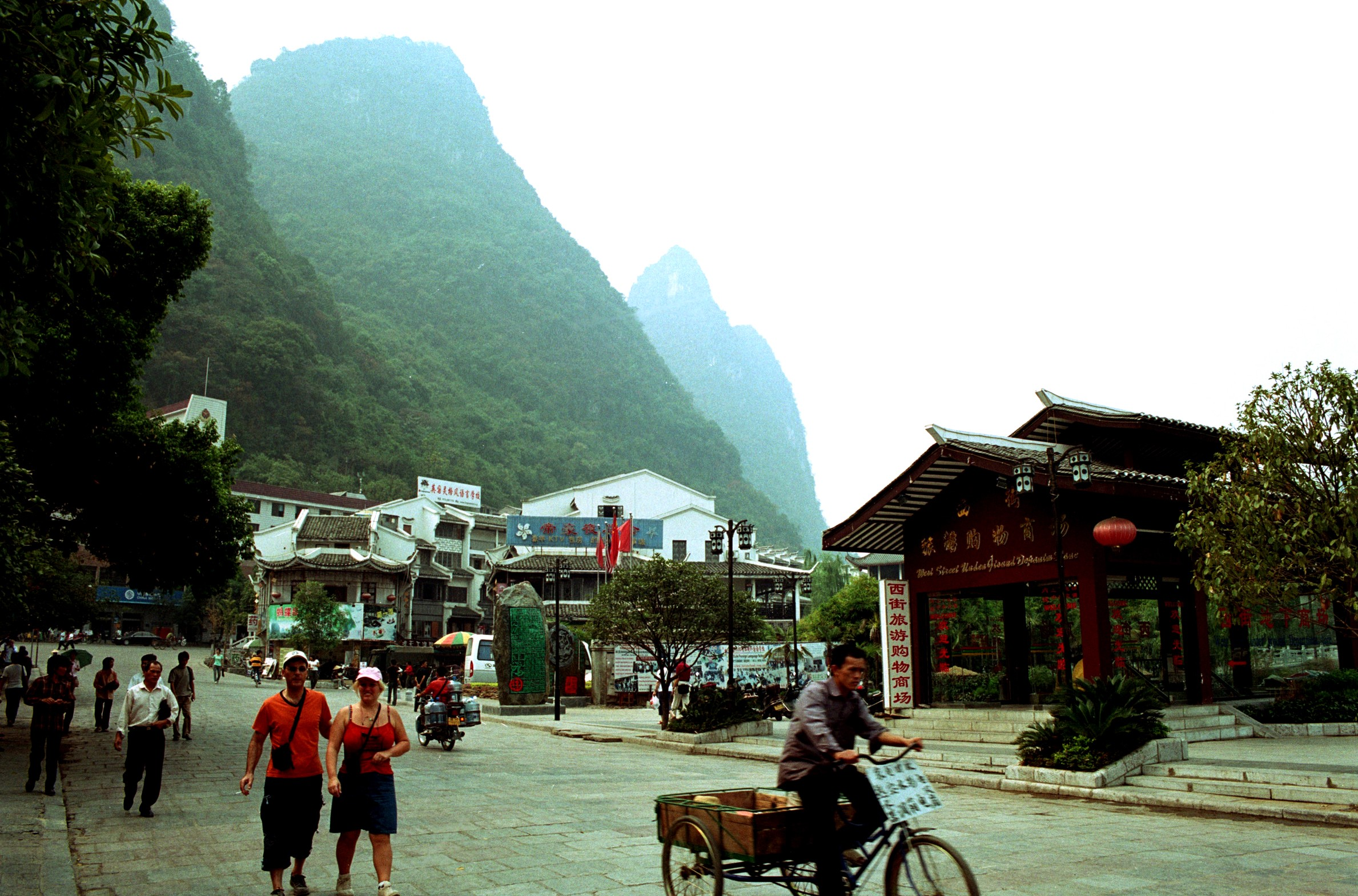 阳朔西街 West Street, Yangshuo